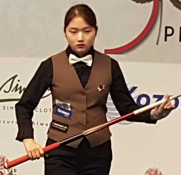 Finale der Jennifer Shim International 2019 zwischen der niederländischen Titelverteidigerin Therese Klompenhouwer und der späteren Siegerin Han Ji-eun aus Südkorea.